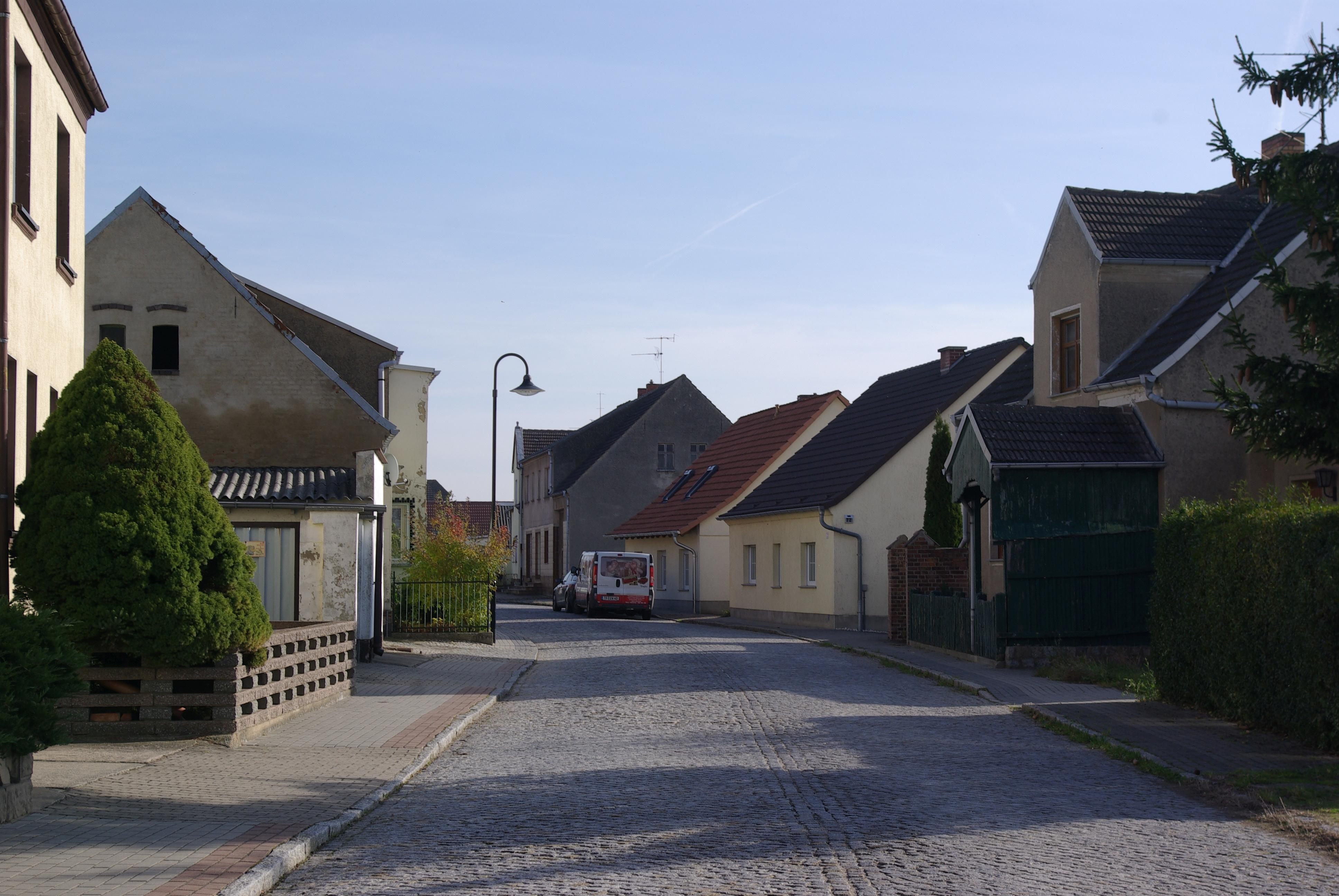 Niedergörsdorf, Ortsteil Malterhausen in Brandenburg. Blick in die Straße Malterhausen Dorf.